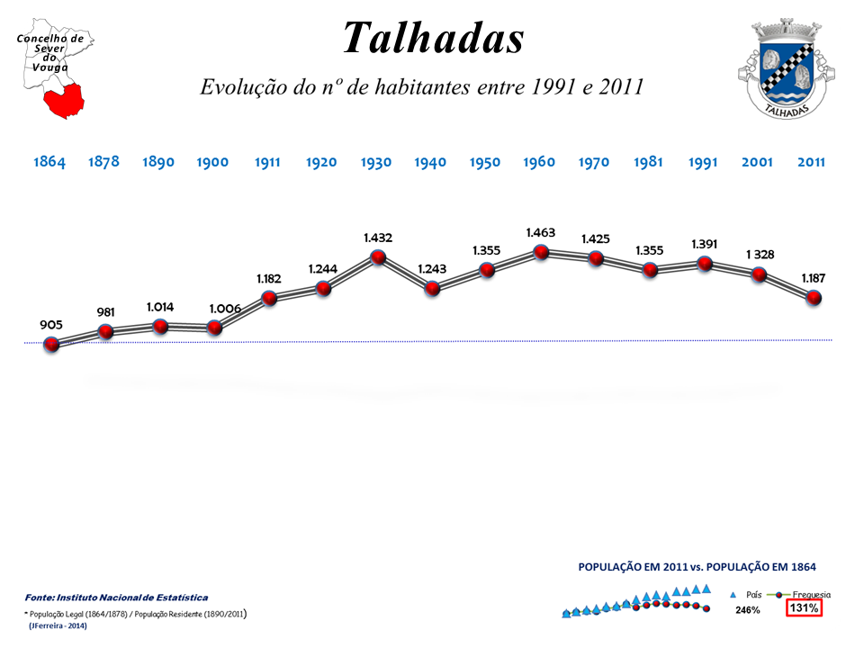 Evolução da População